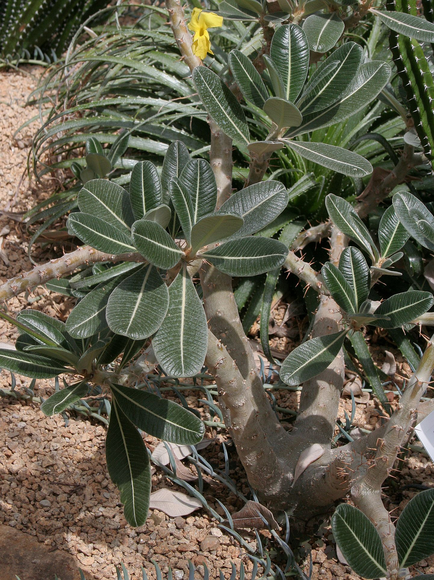 Pachypodium rosulatum, Conservatoire botanique national de Brest, France, juin 2007